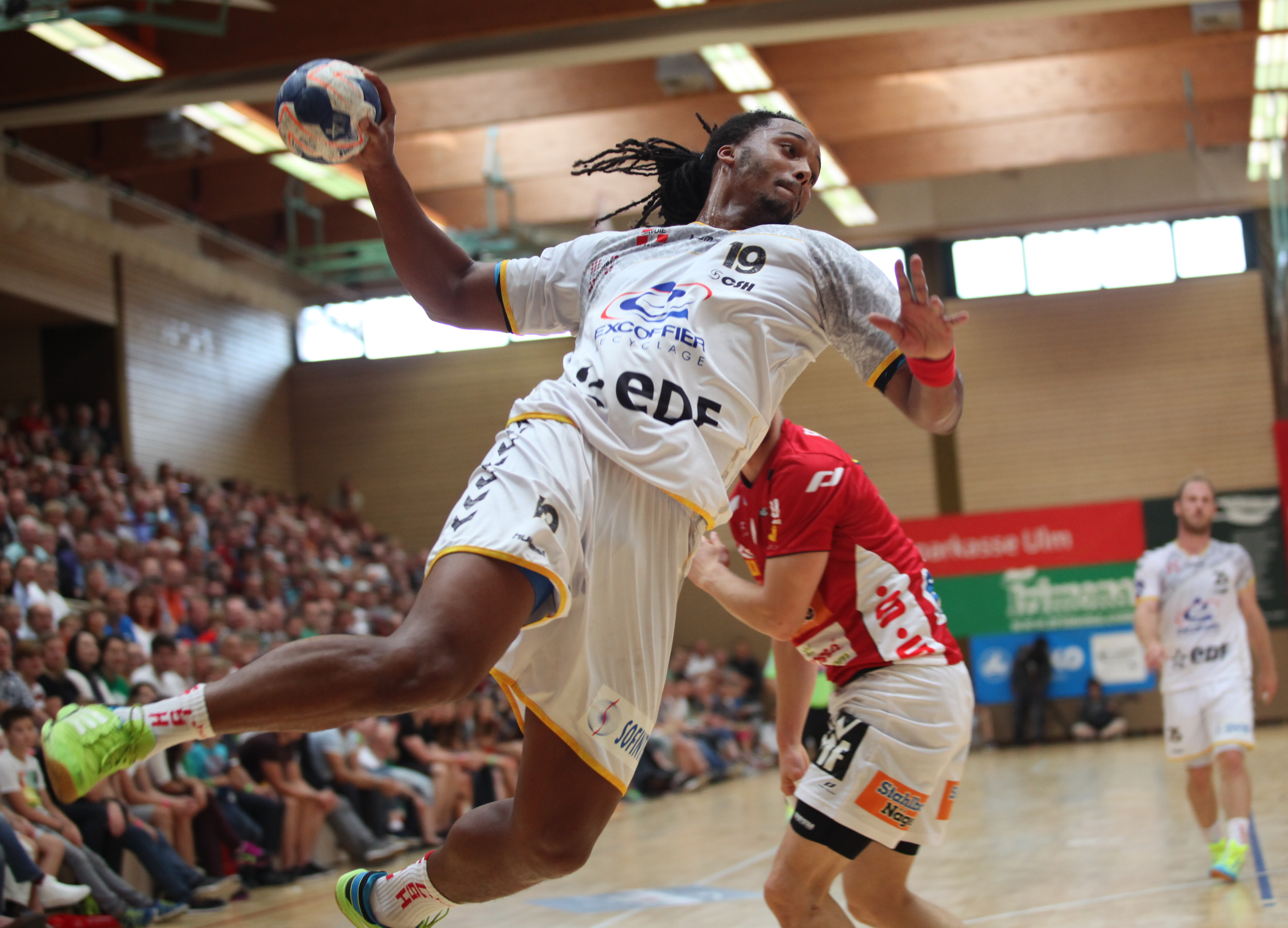 Timothey N'Guessan, Handballspieler von Chambéry Savoie Handball am 17. August 2014 beim Sparkassen-Cup in Ehingen.